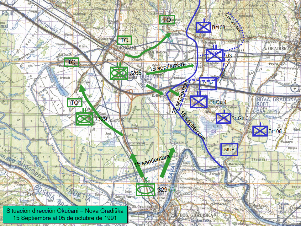 Sobre la base de: Krunoslav Simić. Prikaz novogradiškog bojišta u dnevnom tisku u jesen 1991.godine ( Natko Martinić Jerčić. Oslobodilačke operacije hrvatskih snaga u Zapadnoj Slavoniji u jesen i zimu 1991./1992. godine (